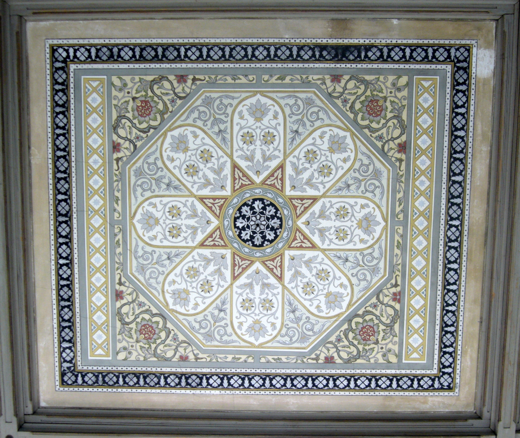 Polichromie w domu przedpogrzebowym na cmentarzu żydowskim w Bielsku-Białej - jeden z trzech kasetonów środkowych.